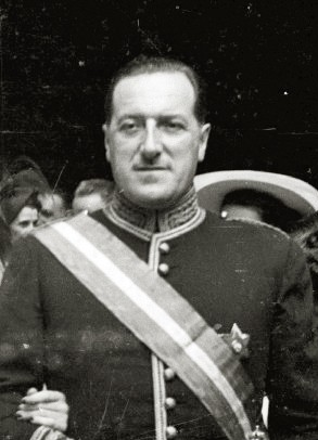 Título original: Boda del embajador Juan Pablo Lojendio y Consuelo Pardo Manuel de Villena, marquesa de Vellisca, en la iglesia de Santa María (3/9) Localización: San Sebastián (Guipúzcoa)